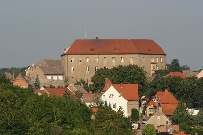 Wettin, Oberburg, eigenes Foto von 2004